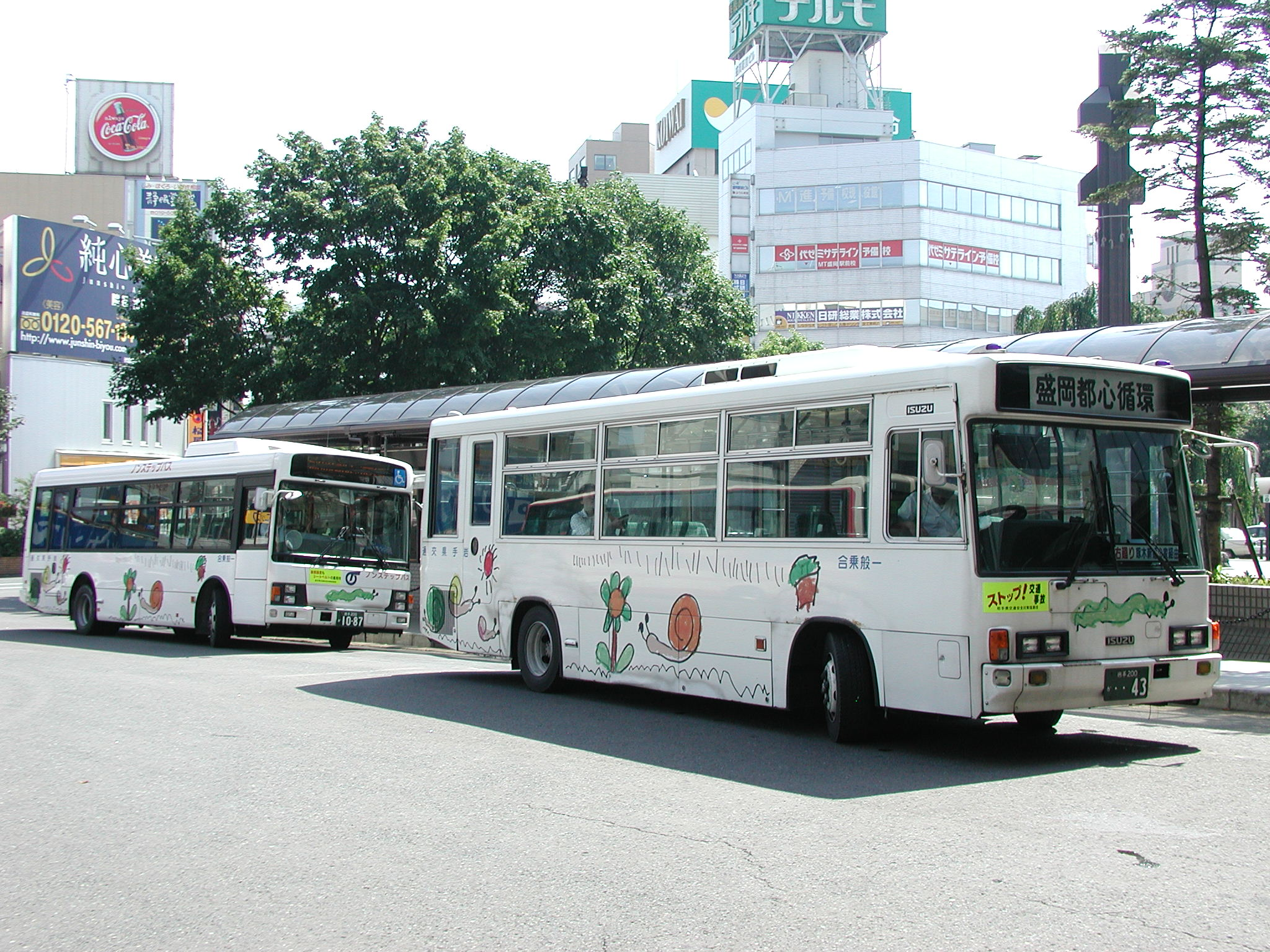 盛岡駅東口に停車している、岩手県交通：でんでんむしの車両 前：いすゞ・ジャーニーK：KC-LR333J・松園営業所所属 後：いすゞ・エルガミオノンステップ：PA-LR234J1・都南営業所所属